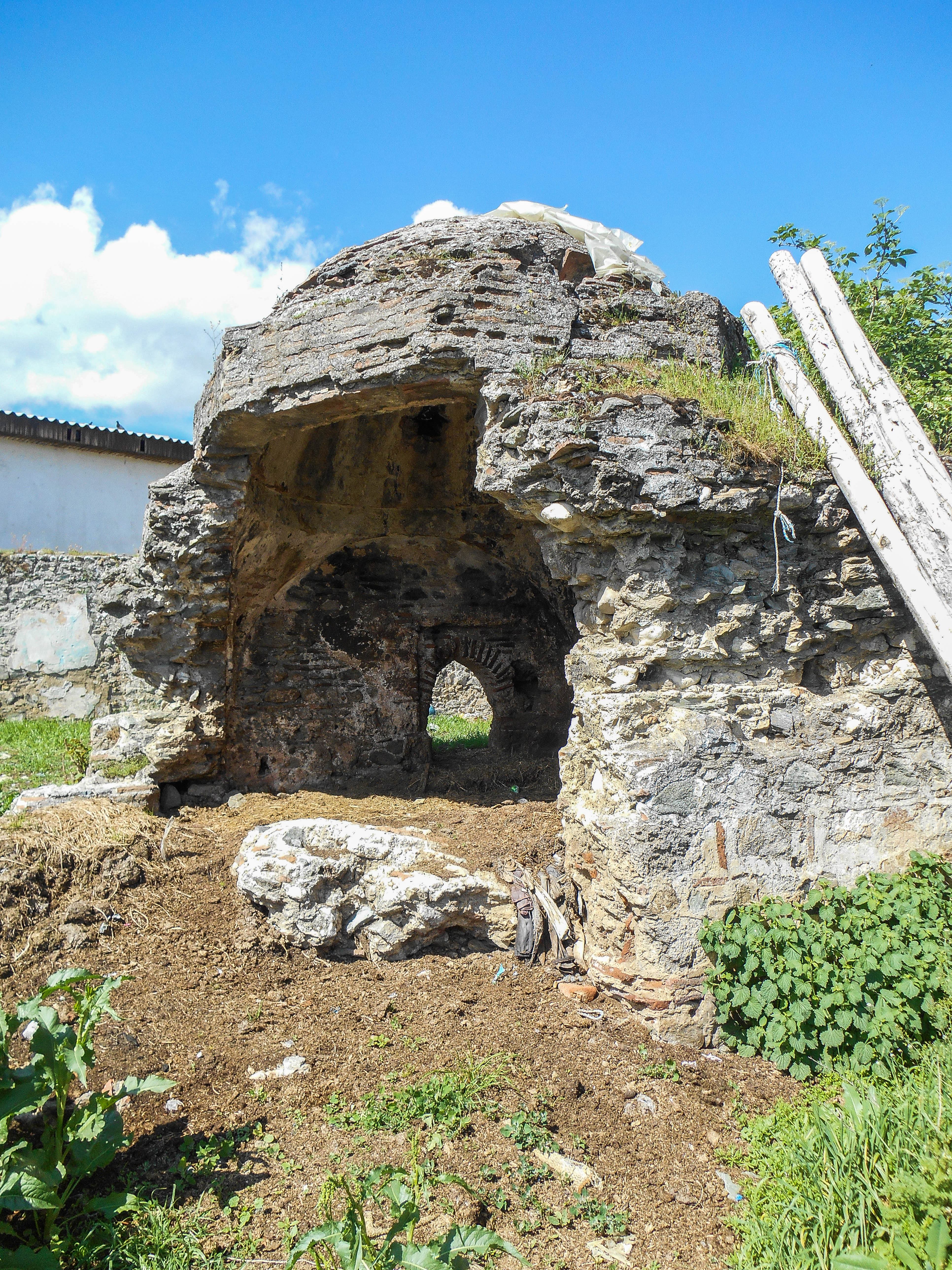 Турска бања во Баница